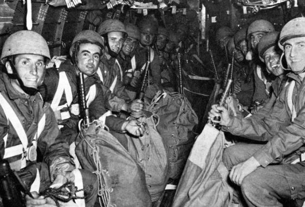 Paracadutisti italiani verso la zona di lancio dell'operazione Herring